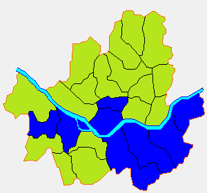 대한민국 제5회 지방 선거 서울특별시장 선거 지역별 1위 후보 (파란색: 한나라당 오세훈 후보가 1위인 지역초록색: 민주당 한명숙 후보가 1위인 지역)